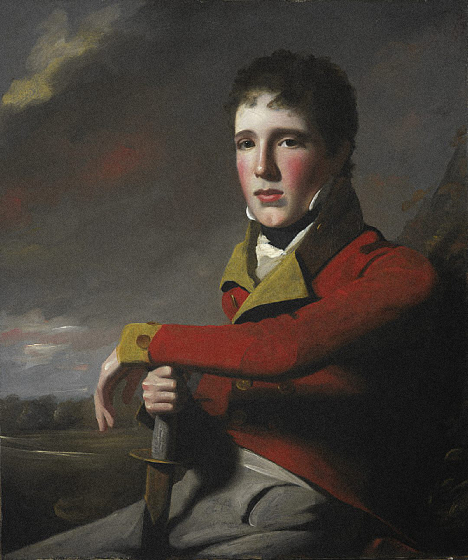 Gemälde von Gregor MacGregor